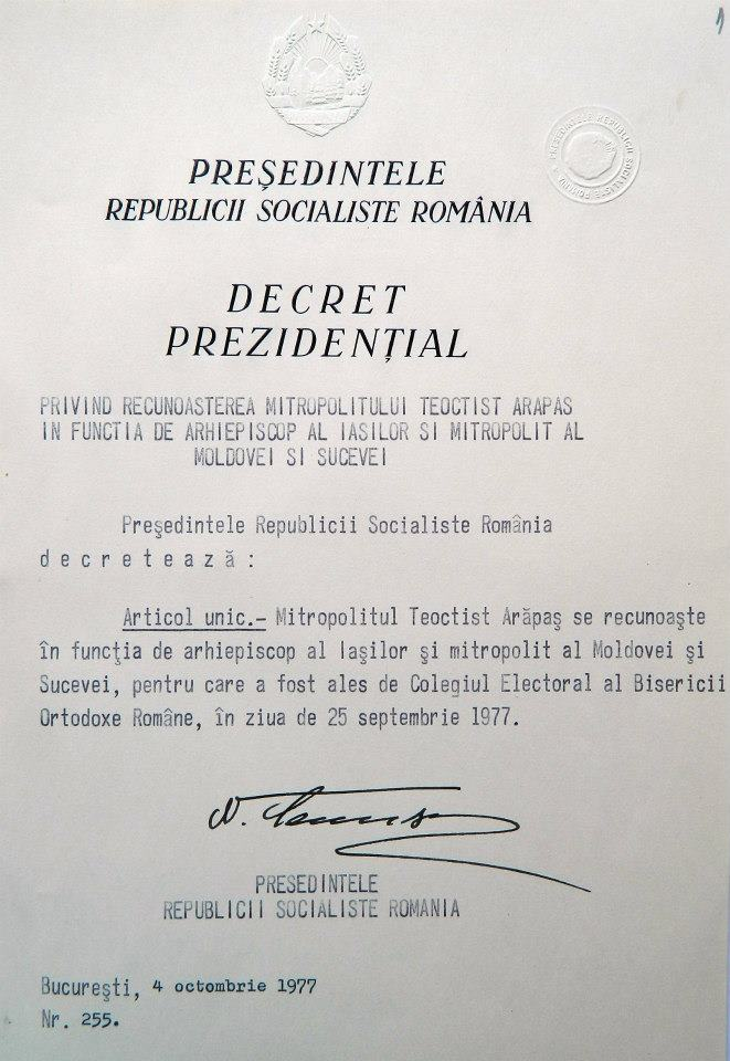 Decret Prezidențial Recunoașterea Mitropolitului Teoctist